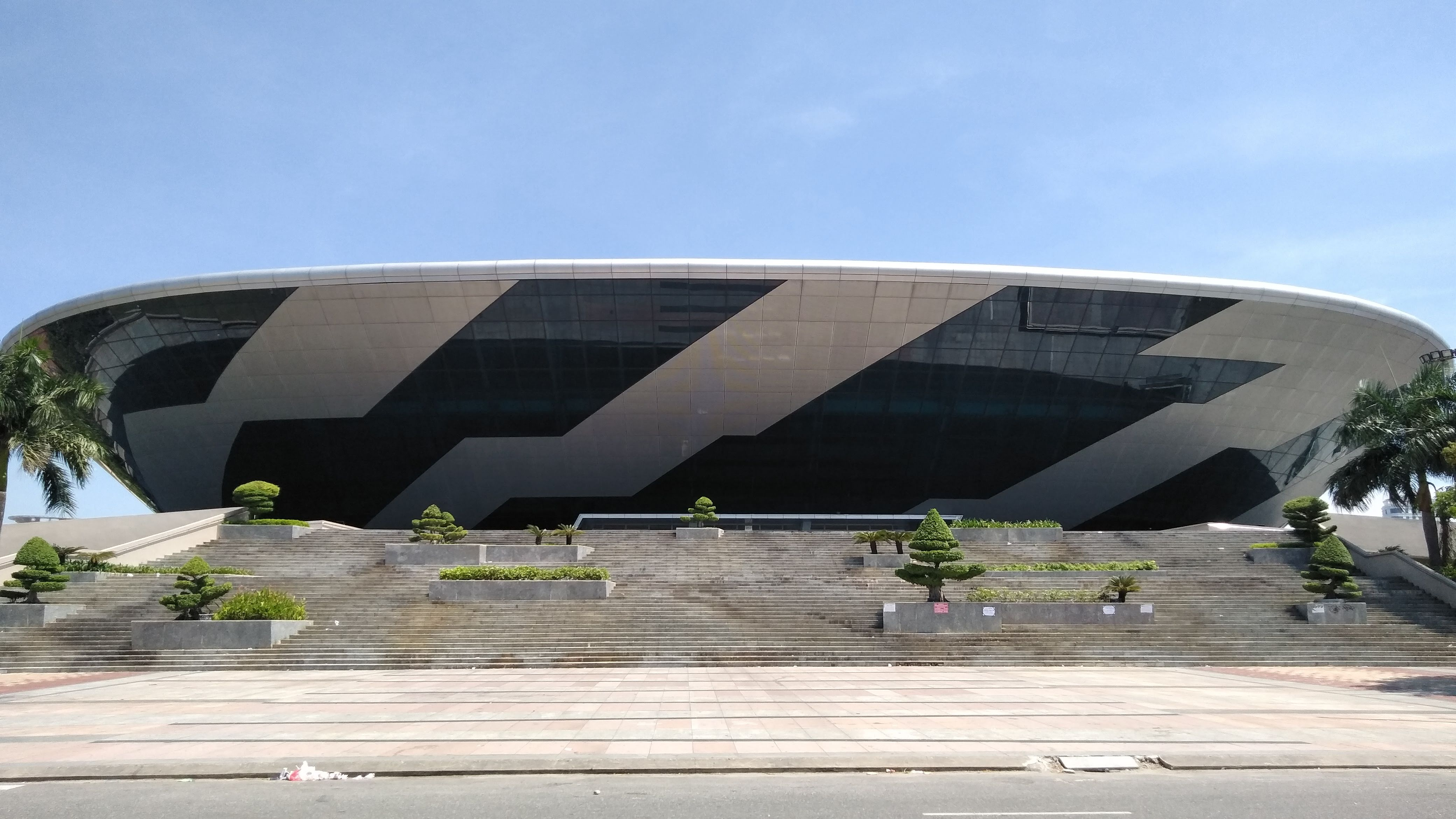 Cung thể thao Tiên Sơn, Đà Nẵng